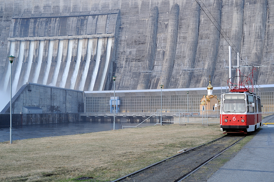 71-88G 6 in Tscherjomuschki